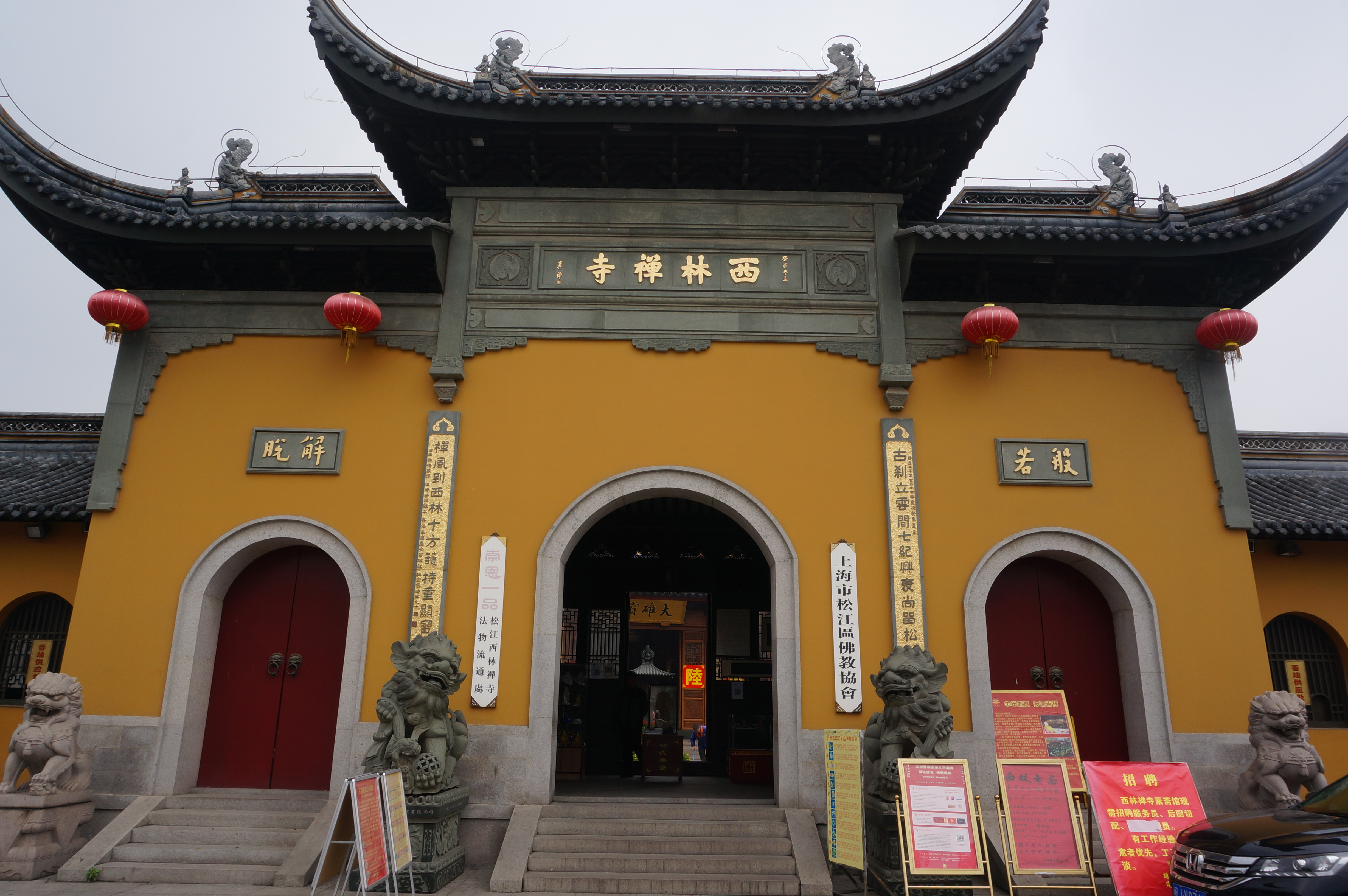 松江西林禅寺，山门外侧。